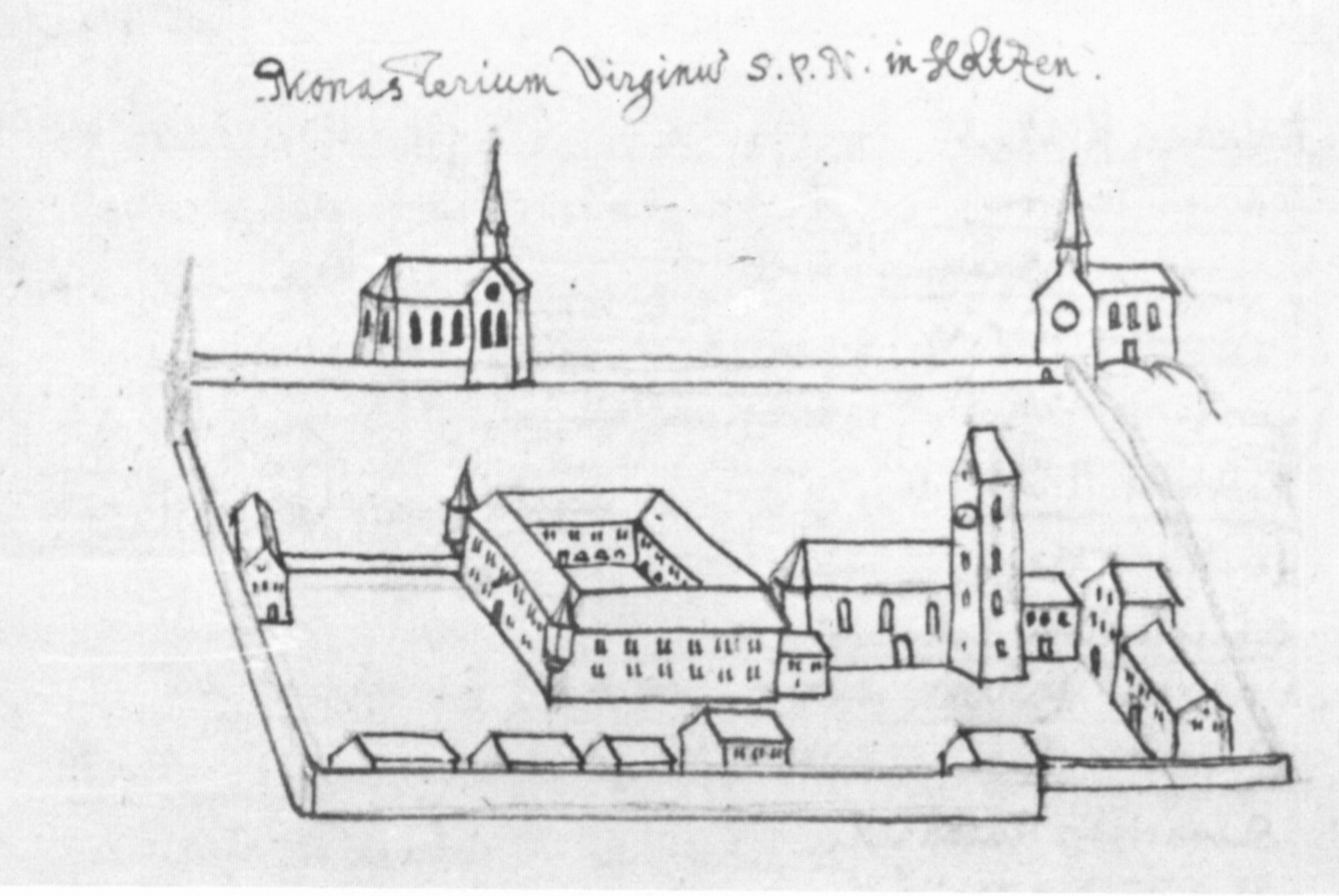 Benediktinerinnenkloster Holzen in Allmannshofen, Landkreis Augsburg, aus: Württembergische Landesbibliothek, HB V 17 fol 415v